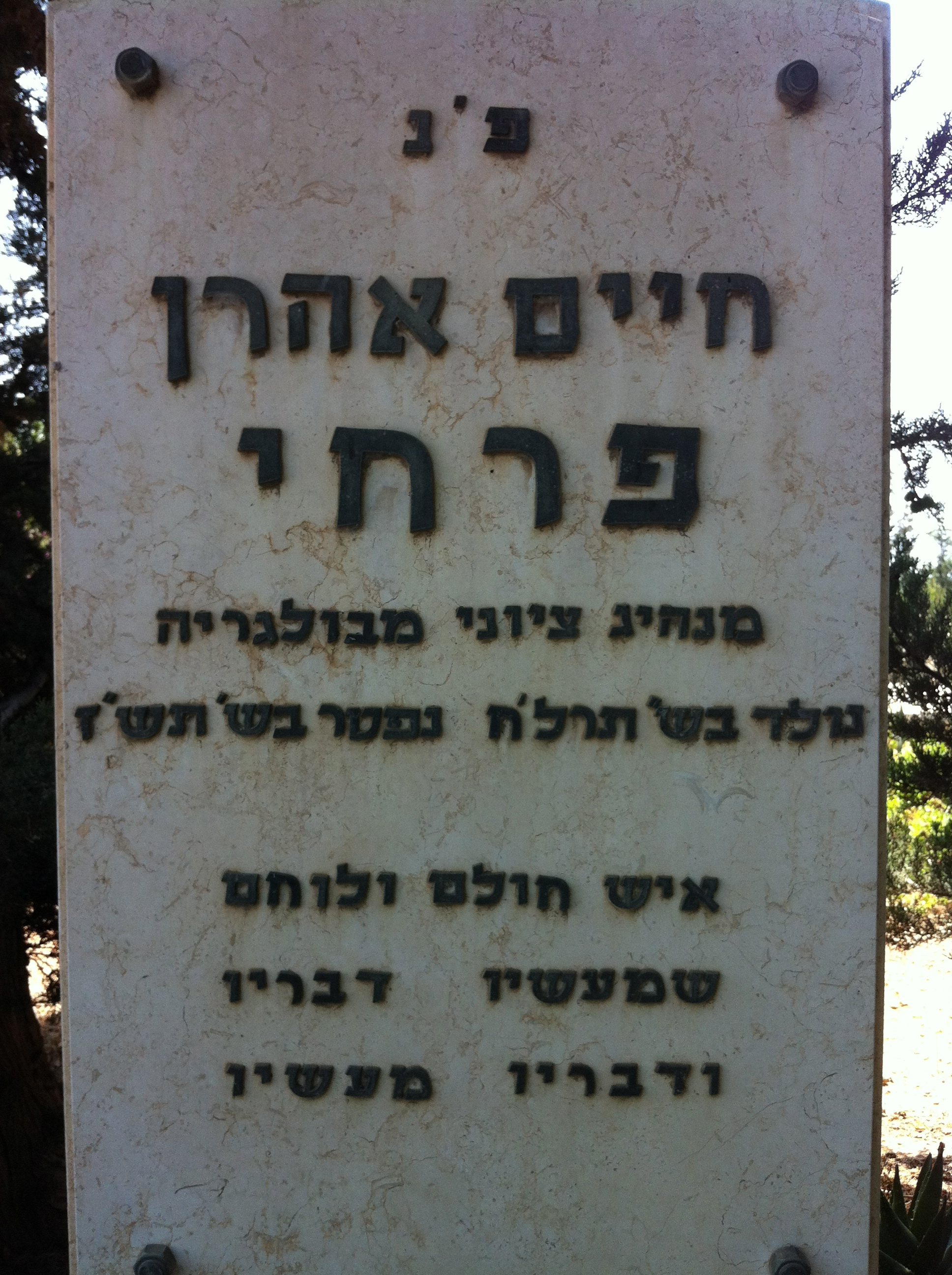 מצבתו של חיים אהרן פרחי. ממנהיגי יהדות בולגריה, התנועה הציונית ויושב ראש הקונסיסטוריה היהודית של בולגריה. צולם בבית העלמין בבית-חנן.